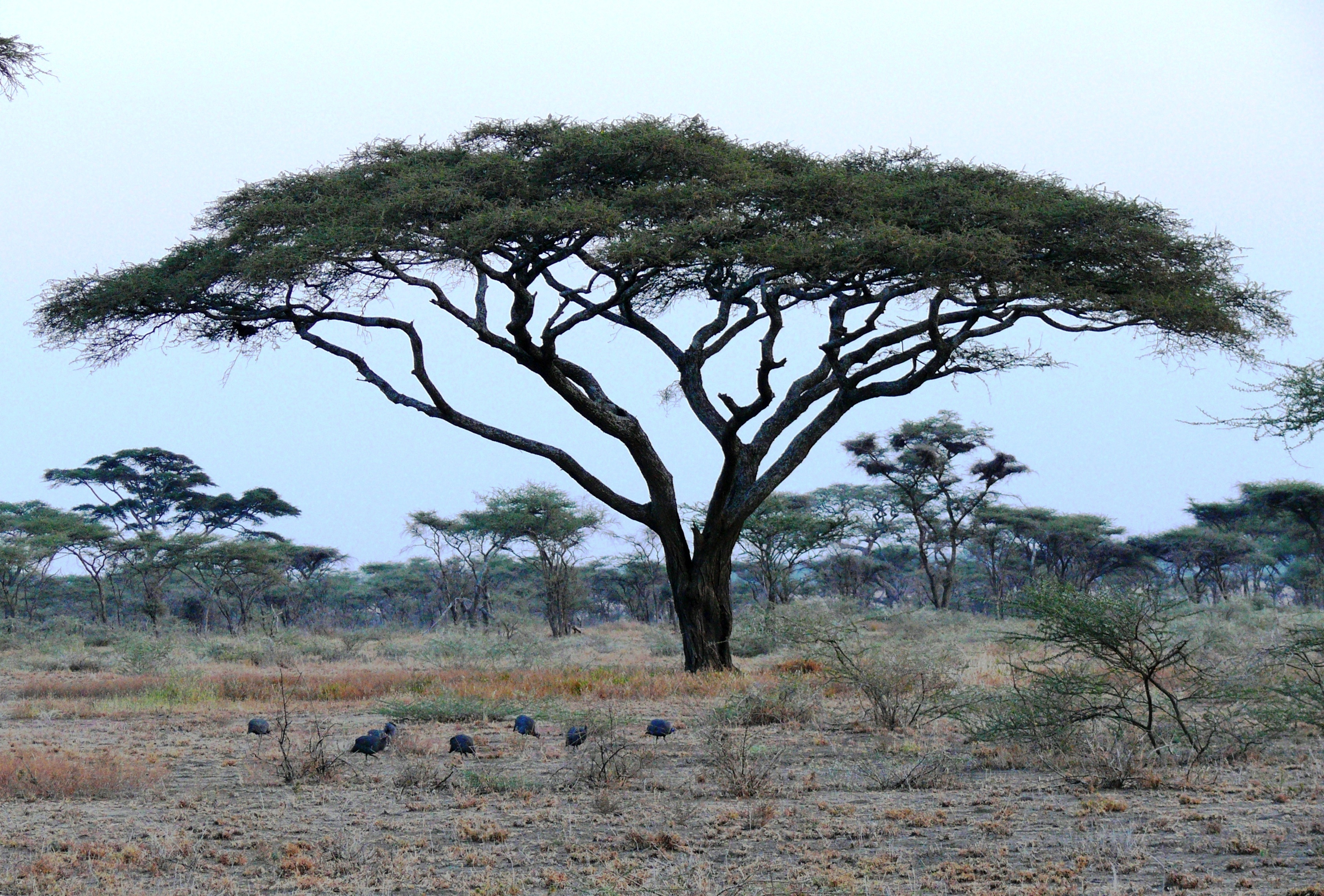 Schirmakazie (Acacia tortilis)